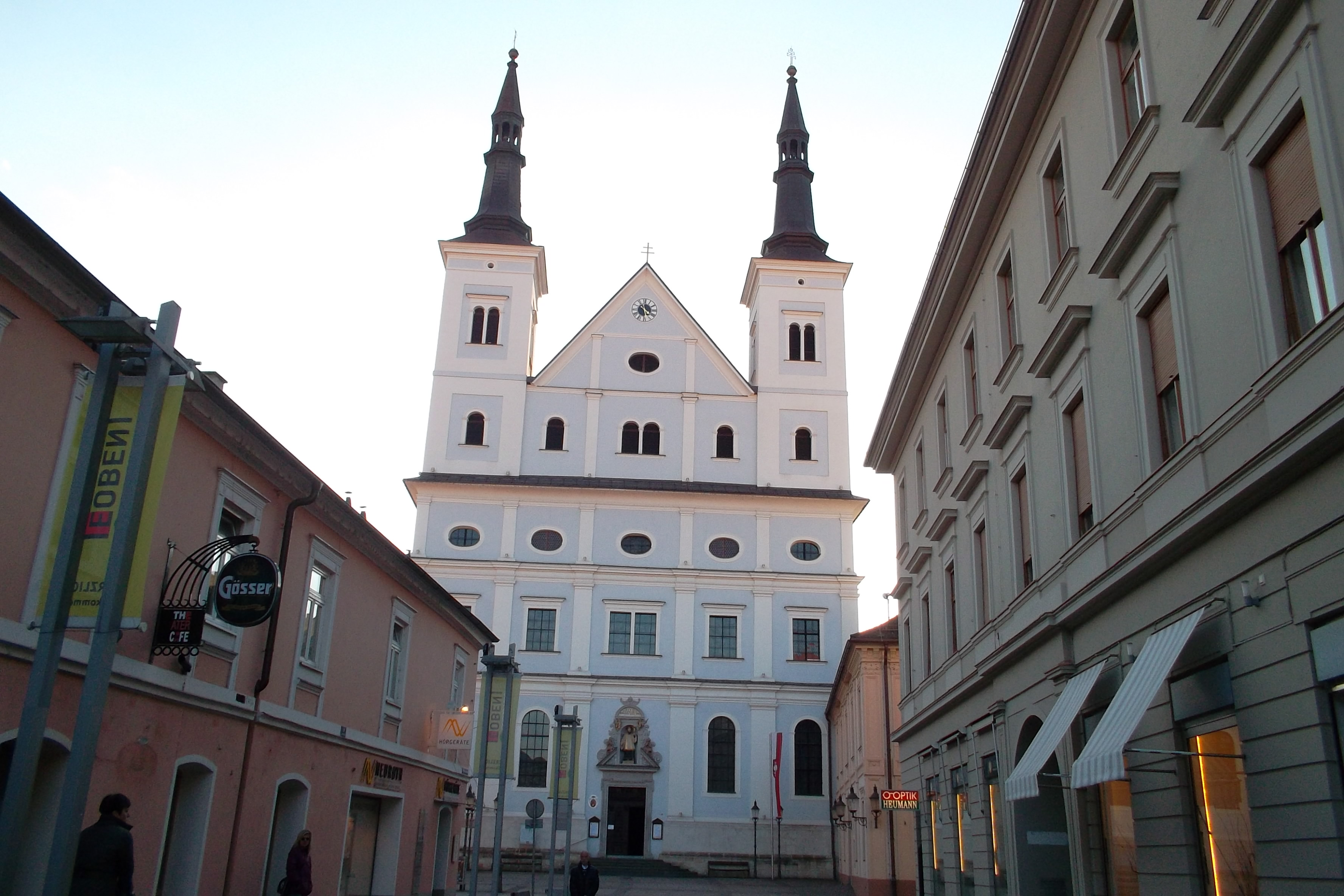 Pfarrkirche St. Xaver in Leoben.